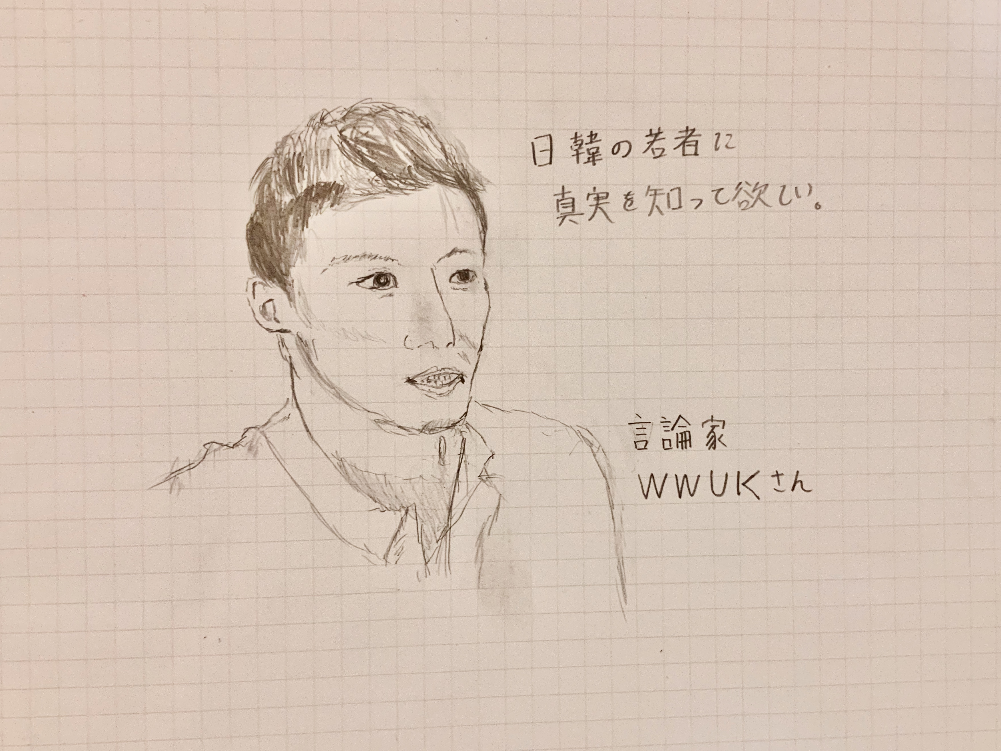 WWUKさんの許可をえて書きました